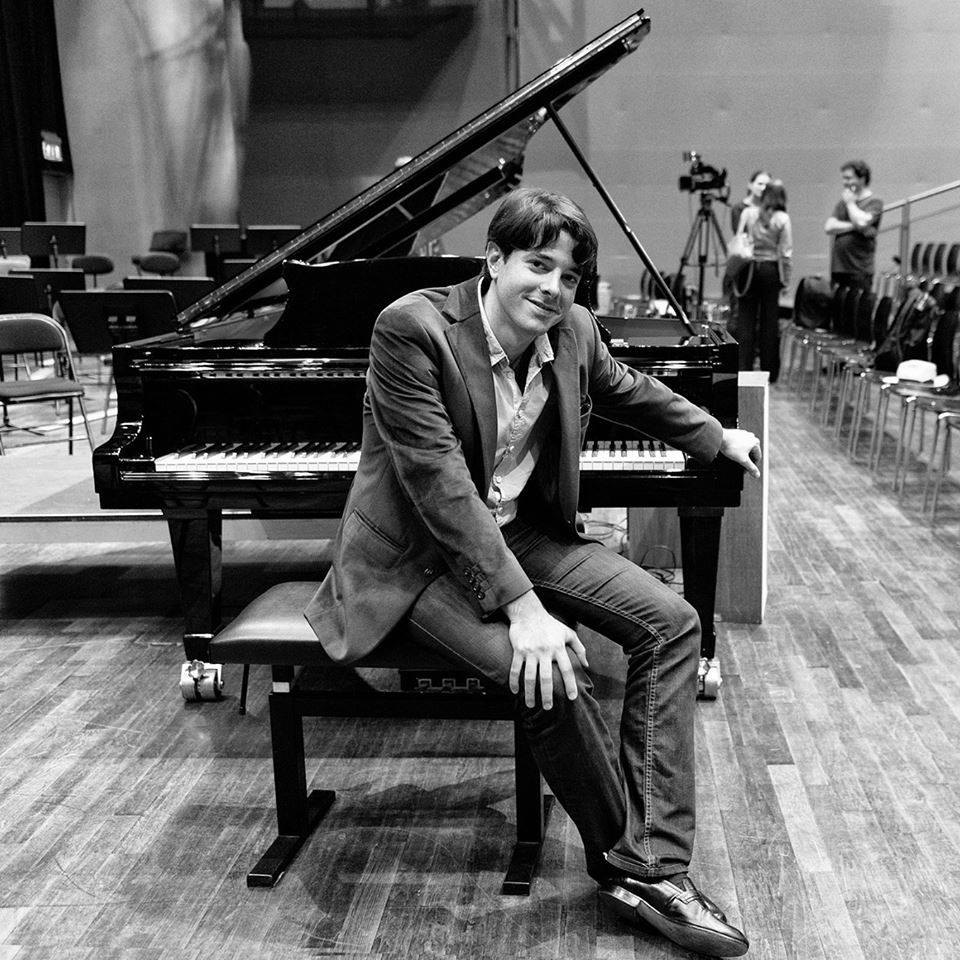 Portrait von Mariano Chiacchiarini